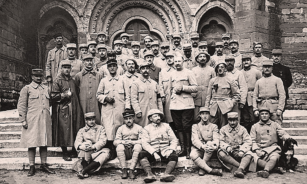 Valréas 5ème section d'élèves officiers composée d'artilleurs et de fantassins, le 5 avril 1916